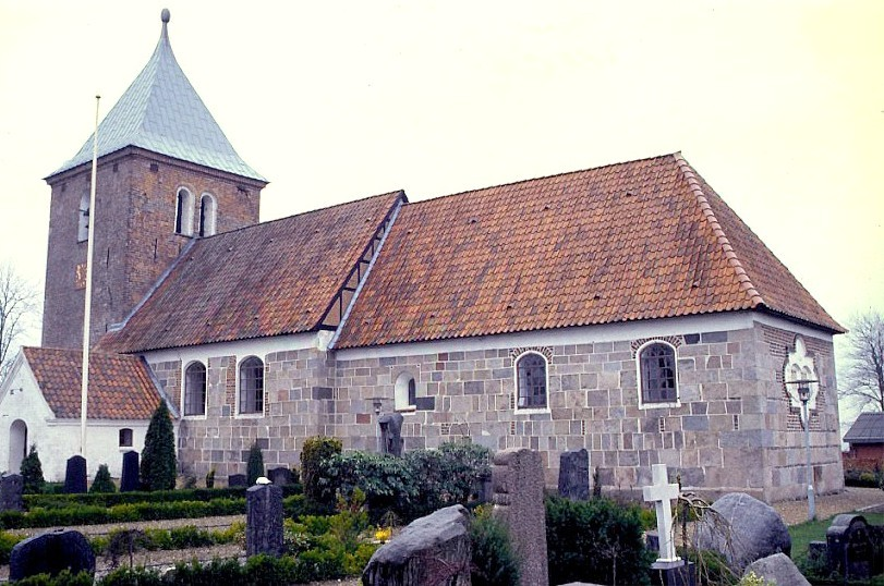 Højbjerg Kirke, set fra sydøst